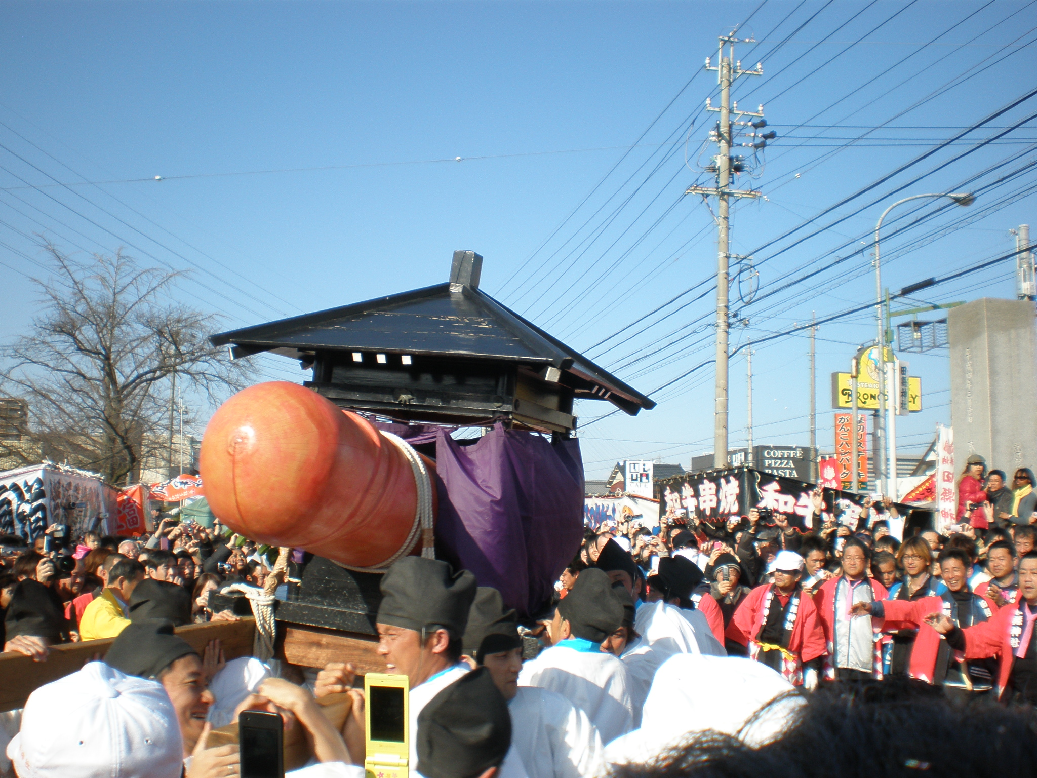 愛知県小牧市の田縣神社で行われる豊年祭。直径60cm、長さ2m余りの大男茎形（おおおわせがた）